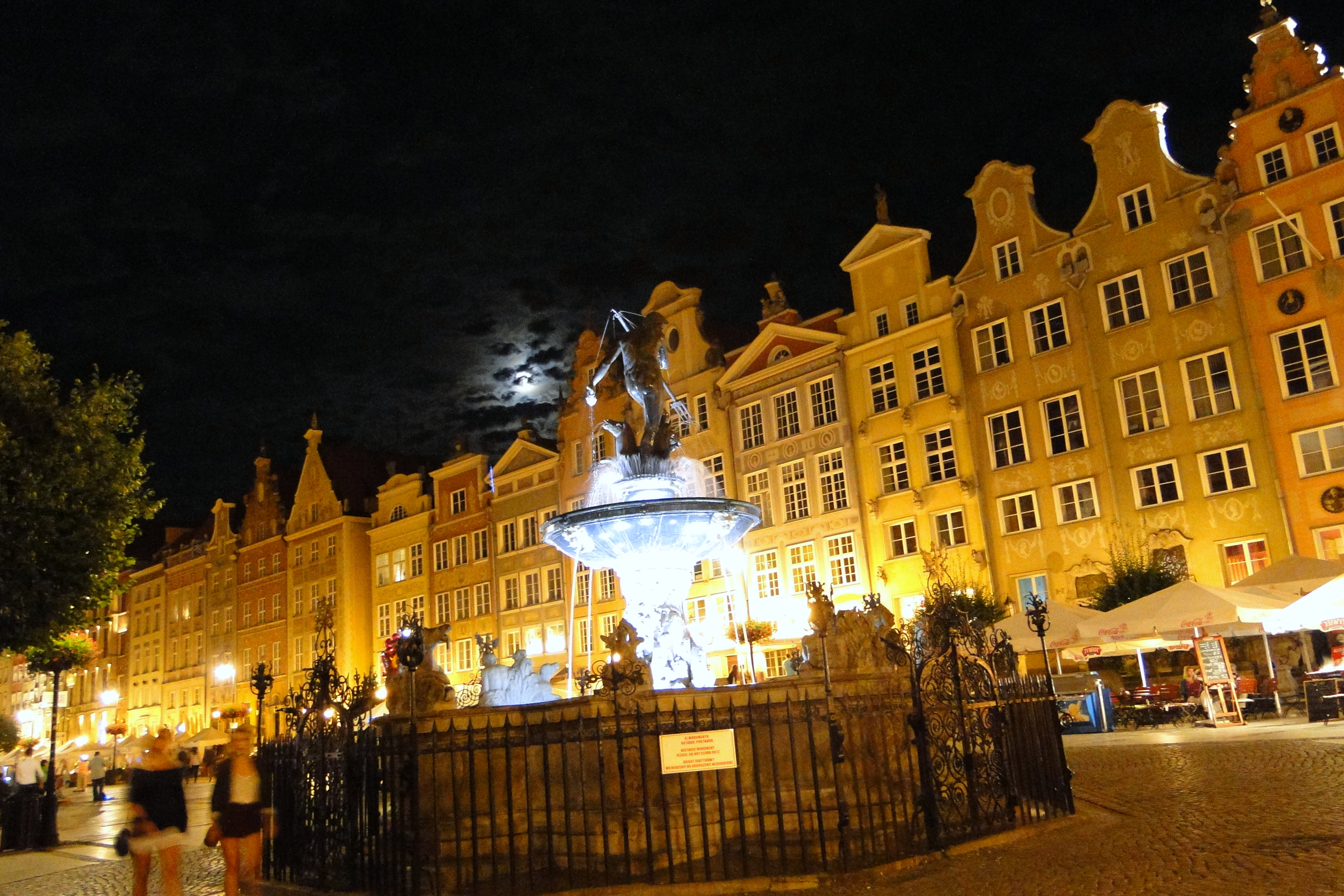 Gdańsk Główne Miasto - Fontanna Neptuna na Długim Targu